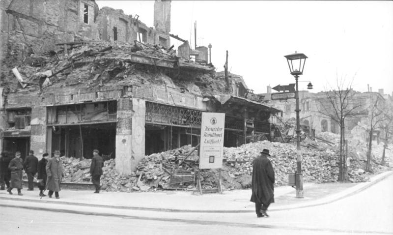 Berlin, zerstörtes Cafe "Kranzler" Zentralbild/Archiv U.B. zeigt die durch britisch-amerikanische Bombenangriffe völlig zerstörte Kranzler-Ecke in Berlin, Friedrichstraße Ecke Unter den Linden. Das Schild verweist auf das neue Domizil der Konditorei an der Ecke Charlottenstraße. (Aufnahme entstand vor dem 9.4.1945 ) 343 - 45